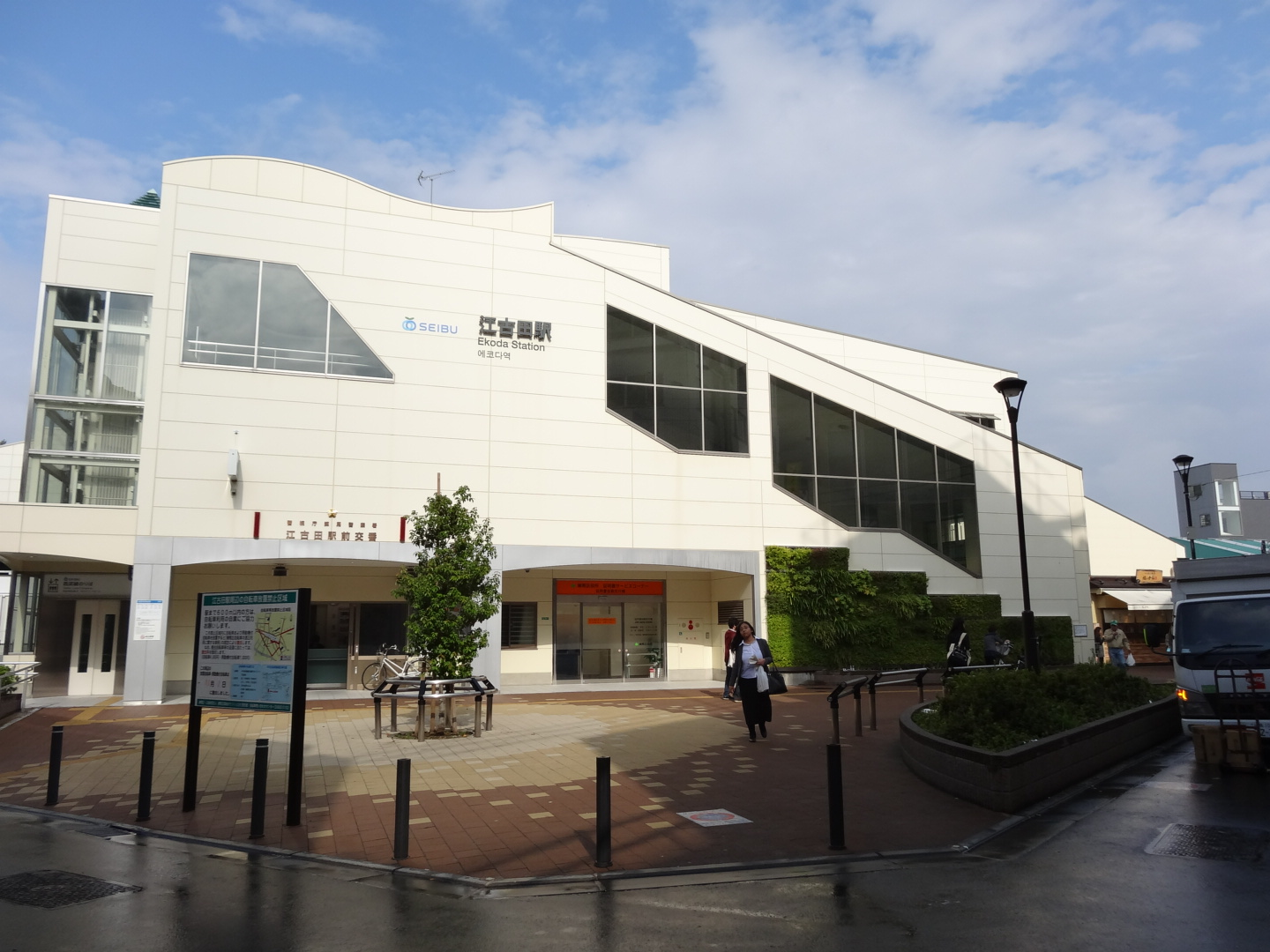 江古田駅南口（2013/11/05撮影）